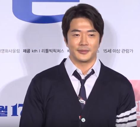 영화 '두번할까요' 제작보고회가 17일 오전 서울 광진구 롯데시네마 건대스타시티점에서 열렸다.